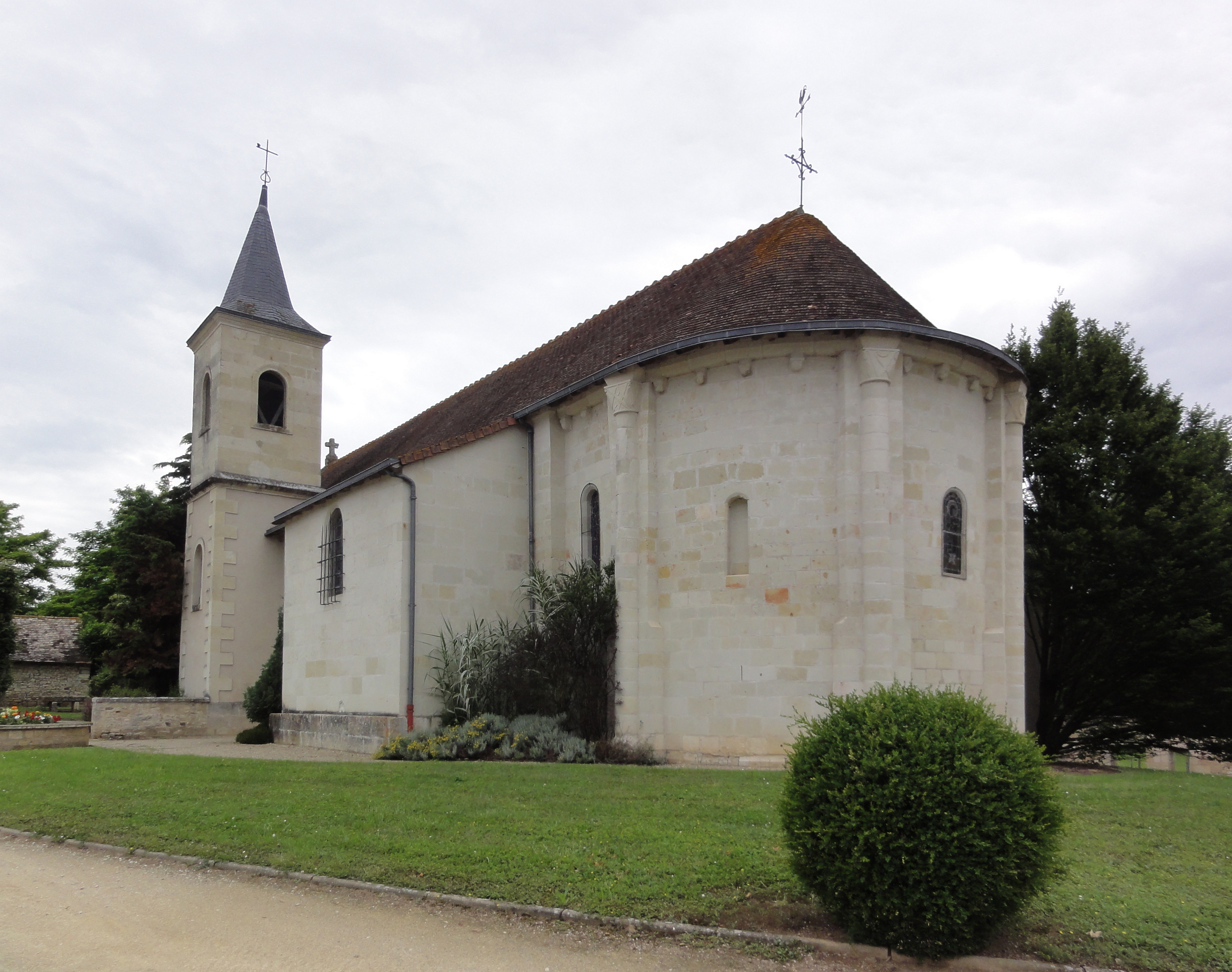 Saint-Cyr (Vienne) église